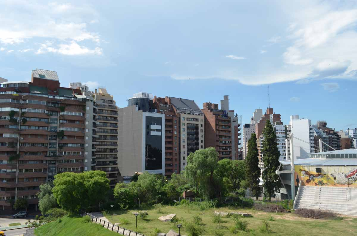 Edificios en la ciudad de Córdoba, Argentina.